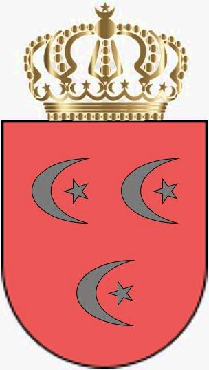 Wappenschild der osmanischen Khediven (Vizekönigen) von Ägypten